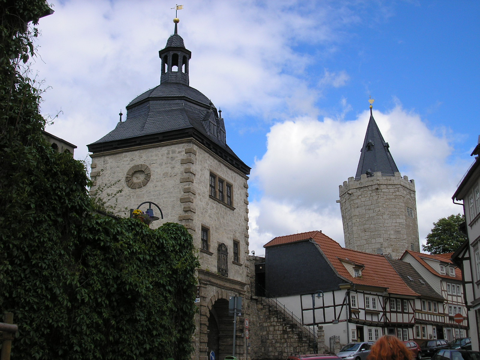 Stadtmauer von Mühlhausen: Frauentor (links) und Rabenturm (rechts).